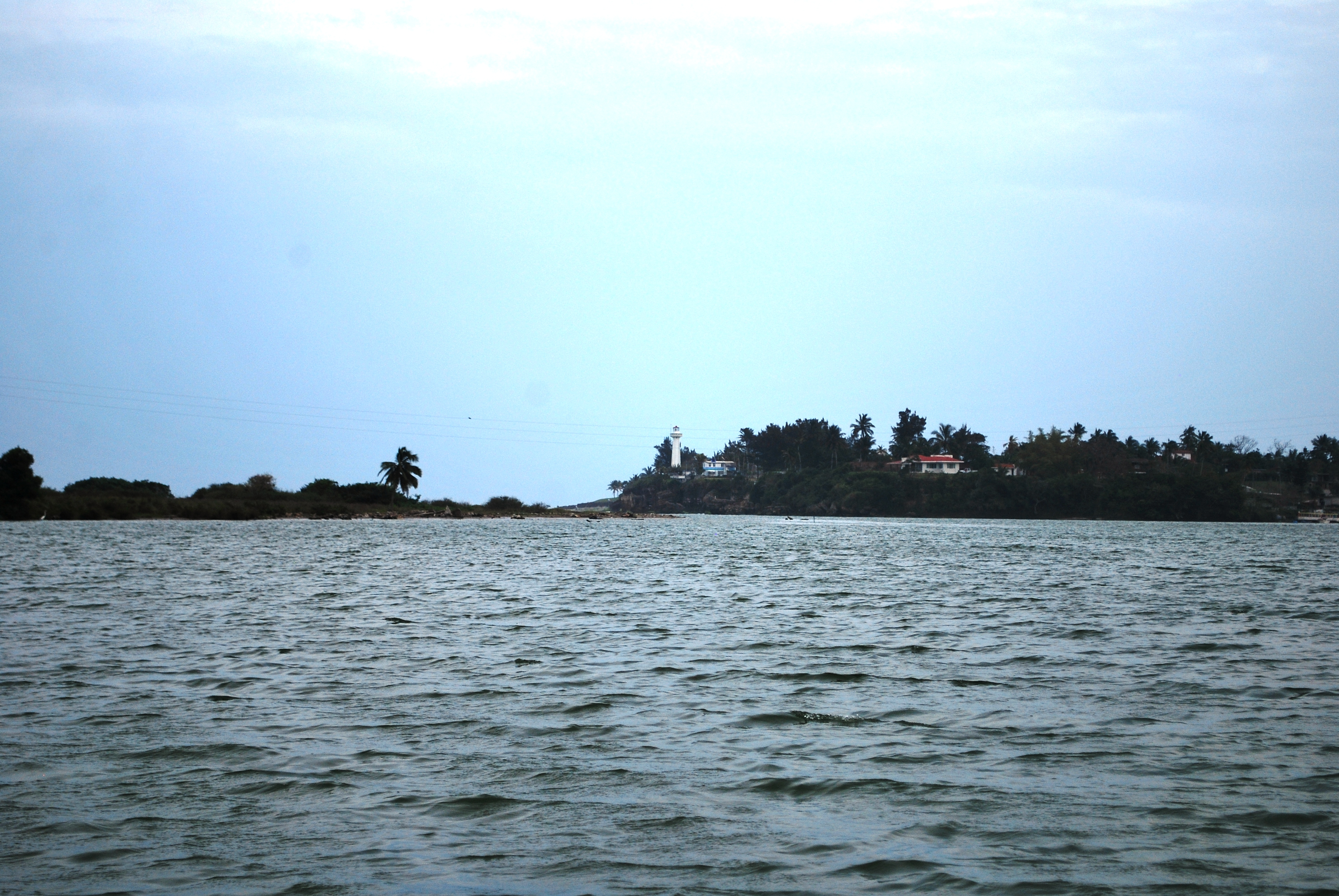 View of the Cazones River near Barra de Cazones, Veracruz